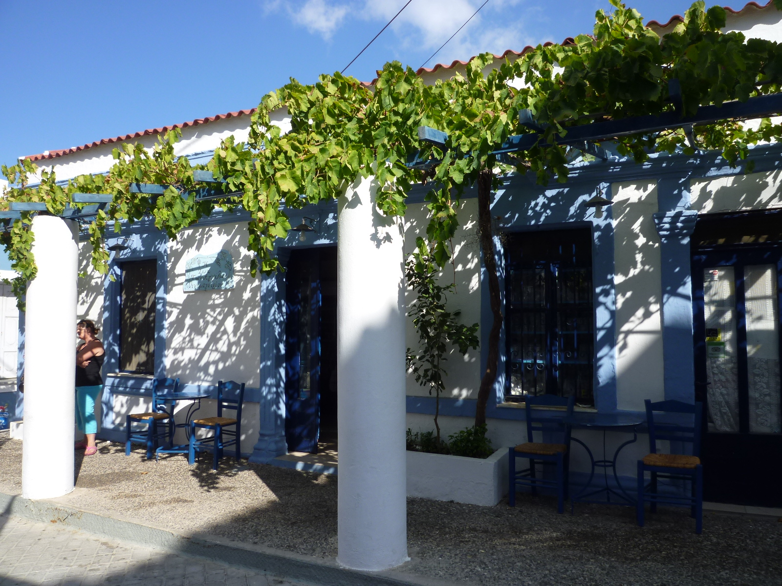 Straße mit typischem Lokal in Pigadia